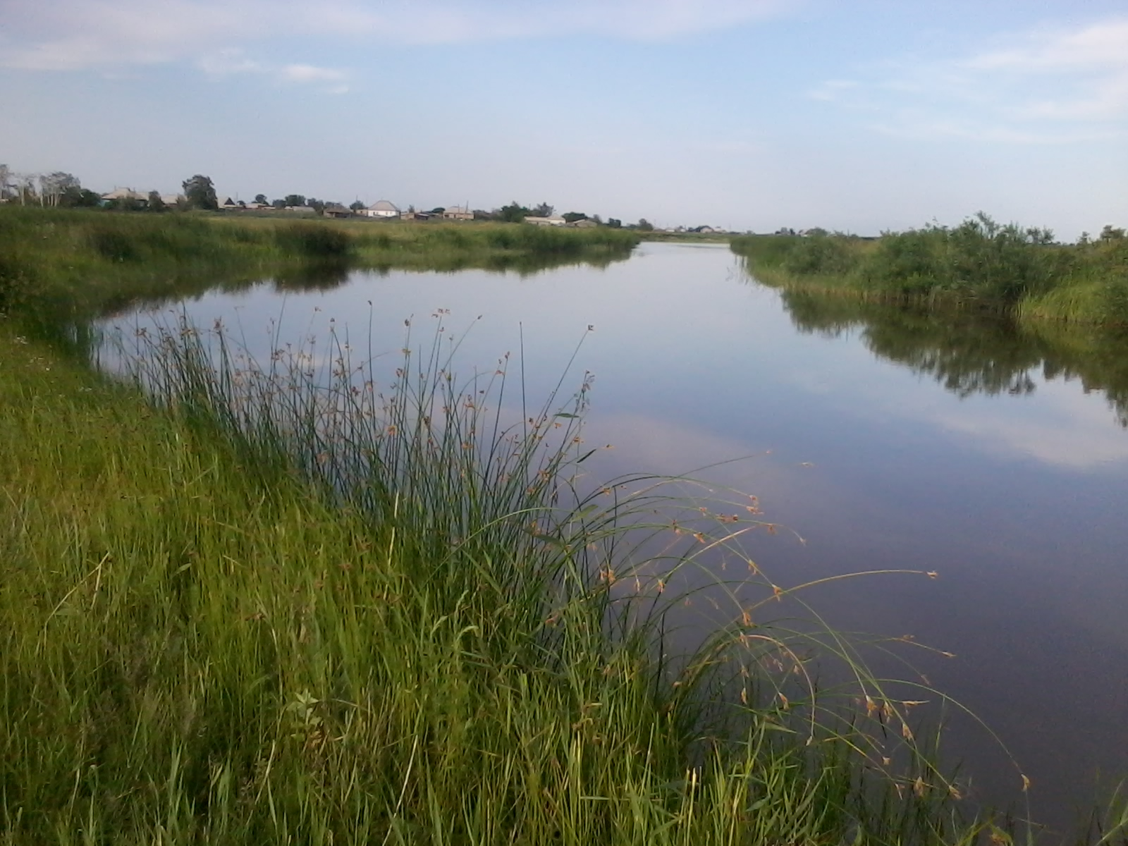 Речка за селом